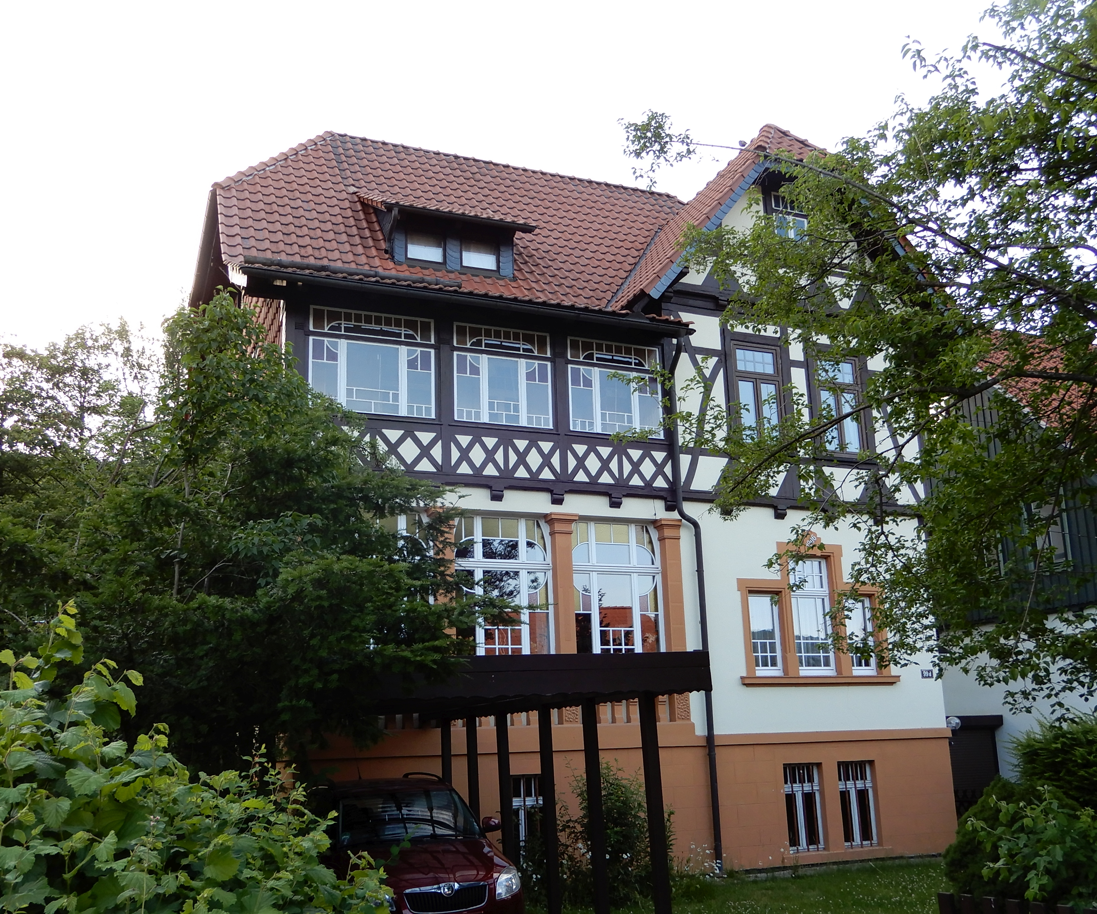 Wohnhaus von 1906 in der Friedrichstraße in Hasserode